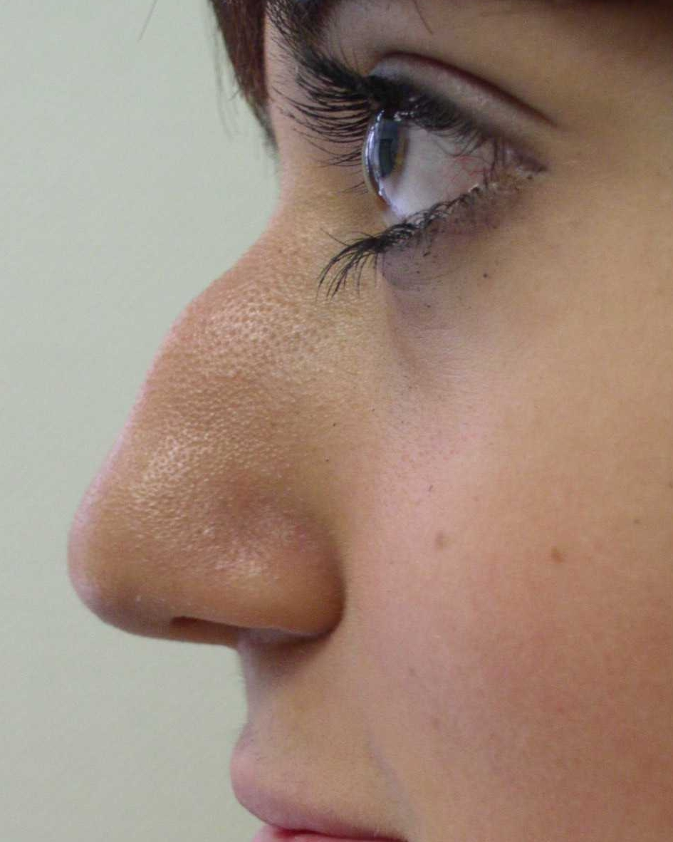 Hump nose